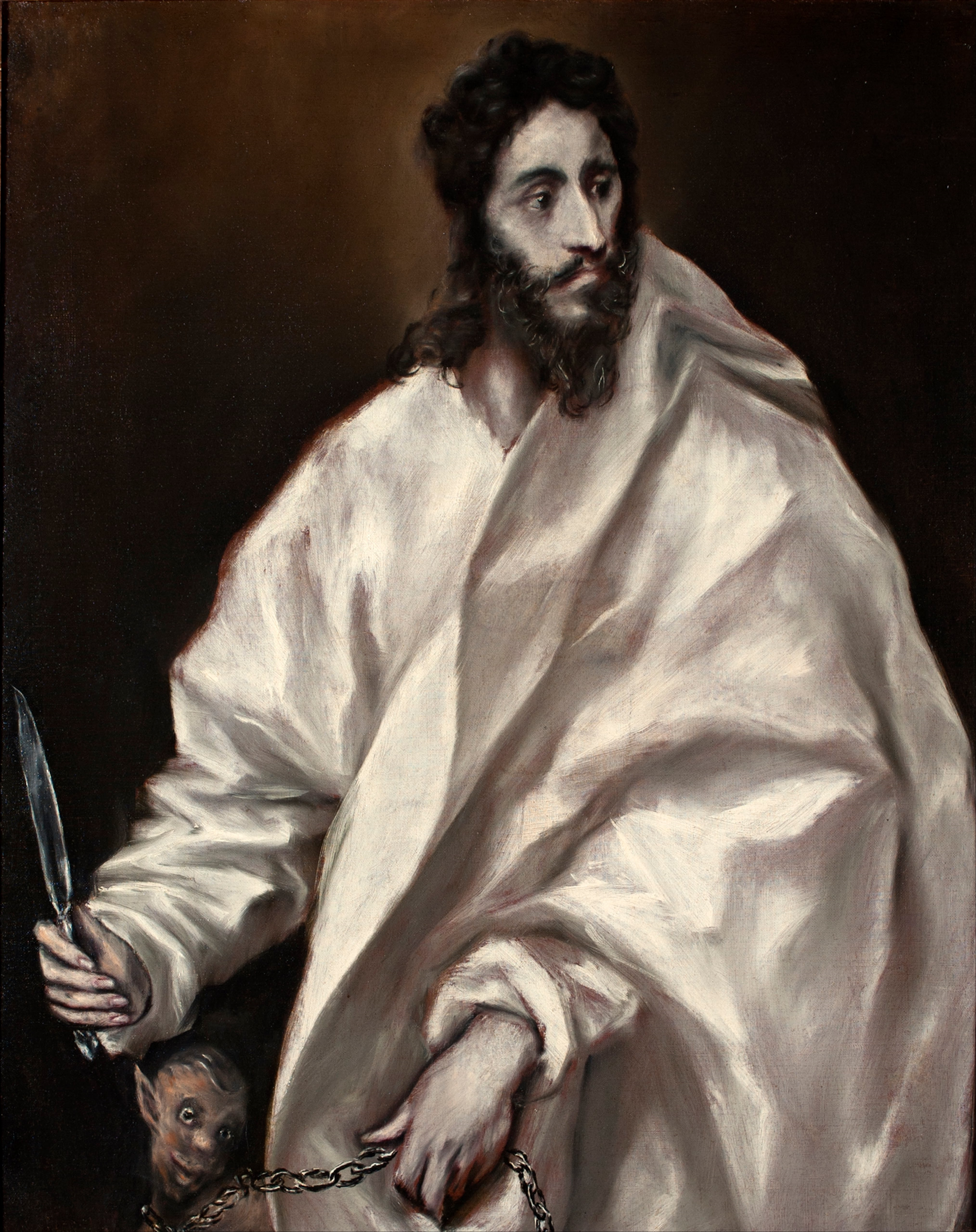 La obra representa a San Bartolomé, uno de los doce apóstoles de Jesucristo y desollado vivo hasta la muerte según la tradición en Armenia.